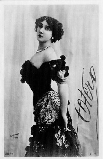 La Belle Otero (carte-postale avec autographe)